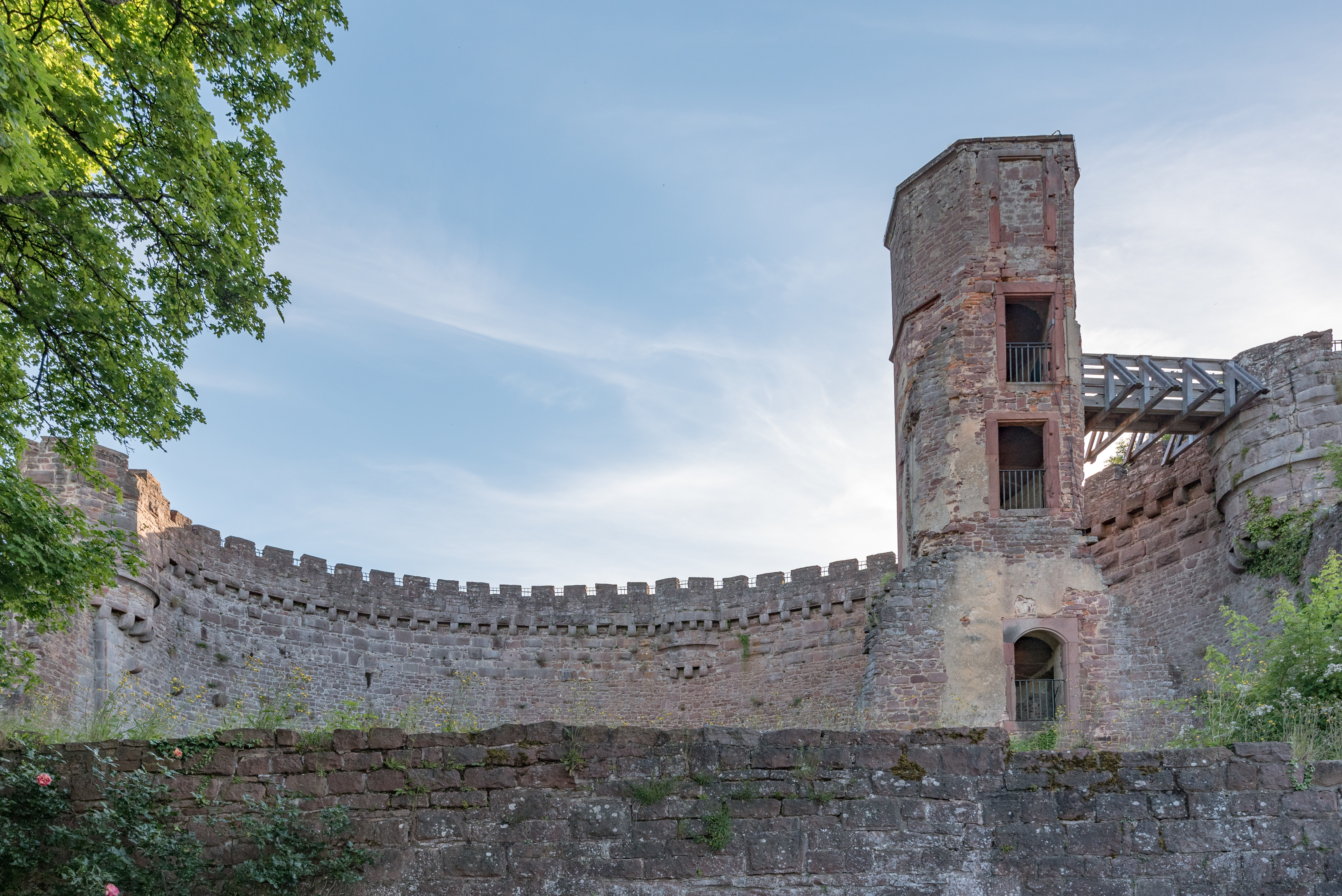 Neckargemünd, Dilsberg, Burg